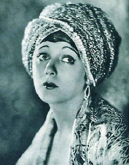 Barbara La Marr